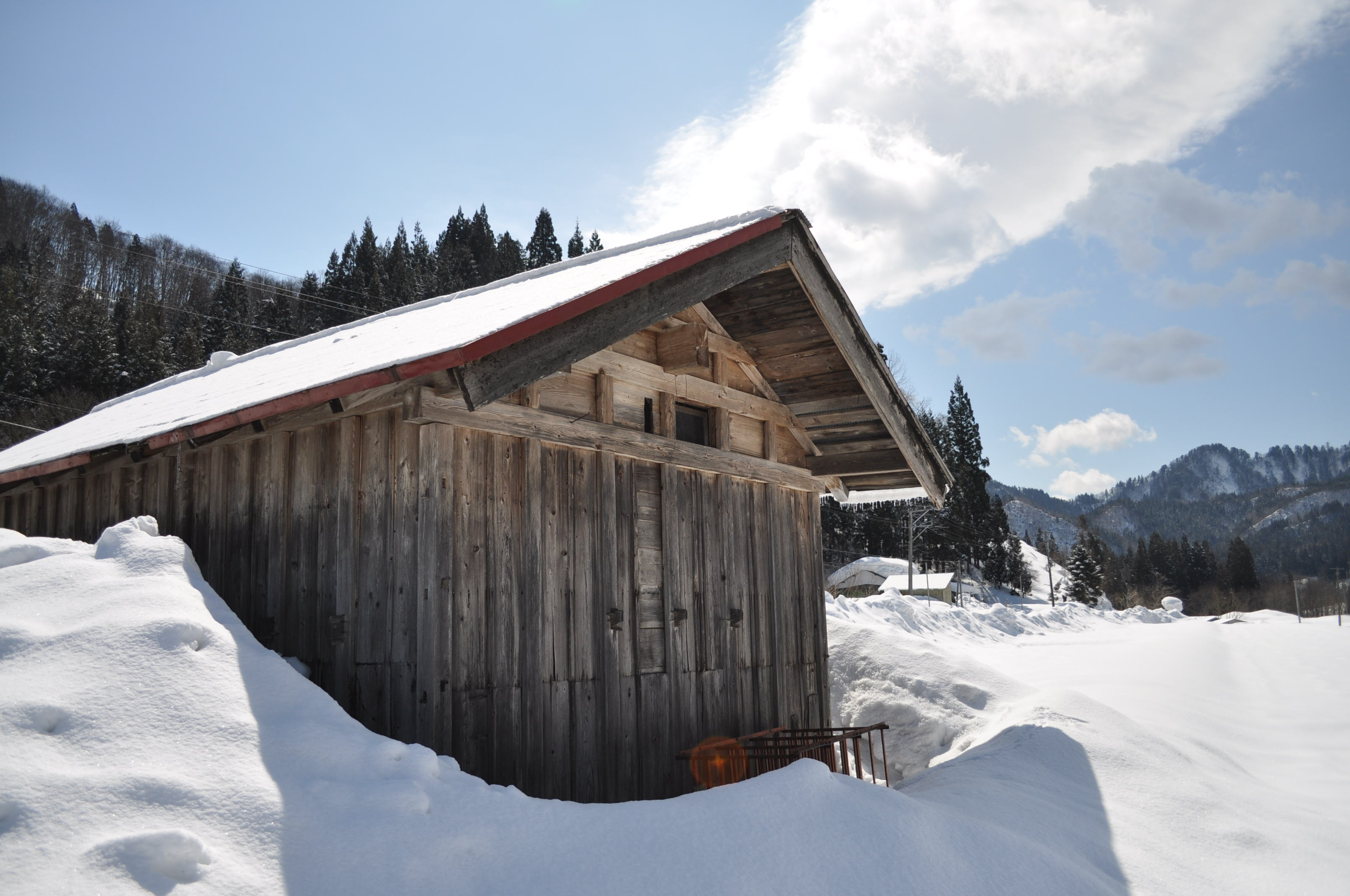 秋田県北秋田郡上小阿仁村八木沢集落に残された「蔵」。江戸時代後期の建造物と思われる。 集落は文化10（1813）年、秋田懸北秋田郡荒瀬村根子（現北秋田市）のマタギ衆によって切り開かれた。昭和３0年代、２０棟ほどの蔵が建ちならぶ活気のある集落だったが、いまは当時の面影もなく空間のなかに4棟の蔵だけがポツポツと点在する。「蔵」のなかにわずかではあるが近世のマタギ狩猟用具などの史料が収蔵されていた。その史料から近世、集落は盛んにマタギ文化が営まれていたと思われる。木造二階建て、クギはいっさい使っておらず、梁や柱・土台はスギやナラ材の巨木で窓は二つ北東と南西側にあるだけで歴史が重く漂う。 八木沢集落はマタギ文化が意匠的、構造的に最も発達していたことを裏付けられる貴重な遺産だと思われる。江戸、明治、昭和と当時の面影を固持するかのようにたたずむ。